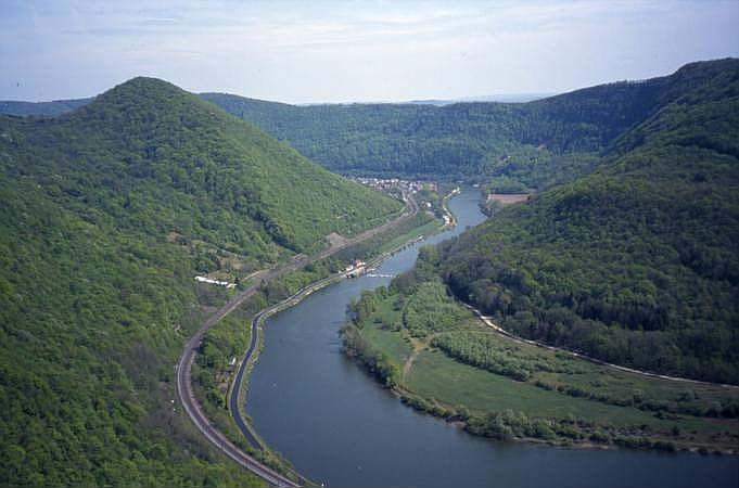 Le Doubs entre Laissey et Deluz Au fond, la petite commune de Laissey, à 20 km en amont de Besançon. Photo prise le 25/04/1997 par Pierre Lavaurs. Publiée sur son site avec la note suivante : À propos du copyright : Ce site n'est pas mon gagne-pain et je n'ai aucun usage des droits de propriété intellectuelle que je peux posséder sur celui-ci. En conséquence, vous êtes libres de faire l'usage que vous souhaitez du matériel y figurant, avec ou non indication de votre source selon votre fantaisie.